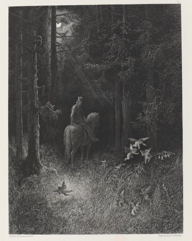 «Pendant qu'il traversait les sombres forêts, il vit lui-même trois esprits fous de joie s'élancer au bord de la route sur une grande fleur», dessin de Gustave Doré pour illustration du poéme "Genièvre" de Alfred Tennyson